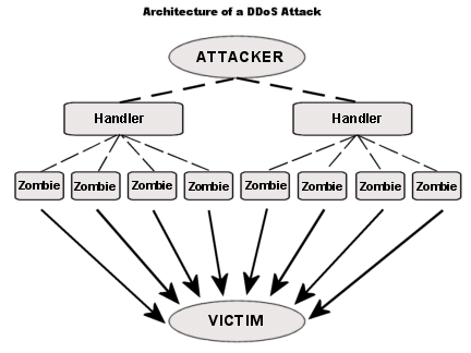 Dos атака